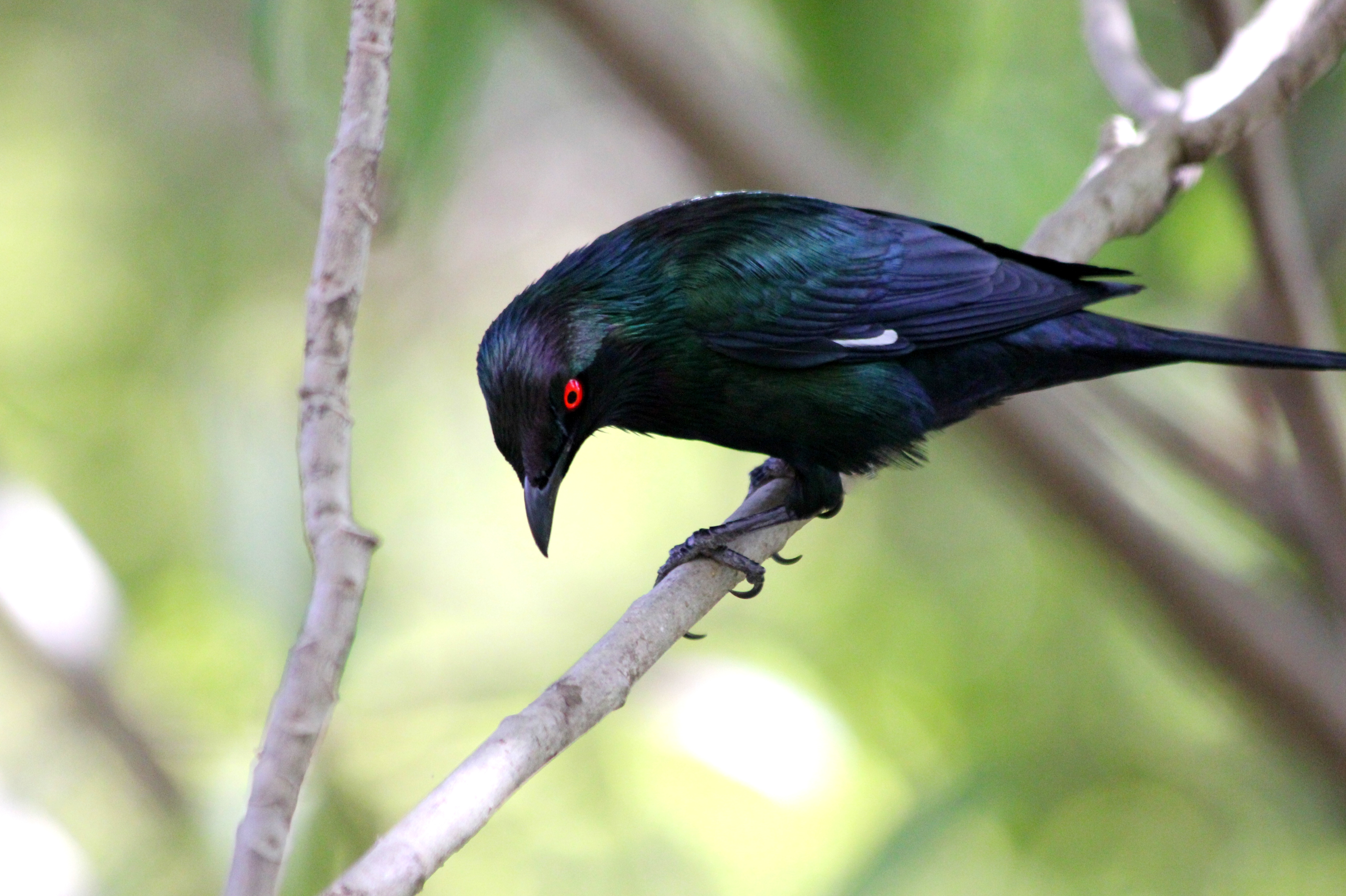 METALLIC STARLING